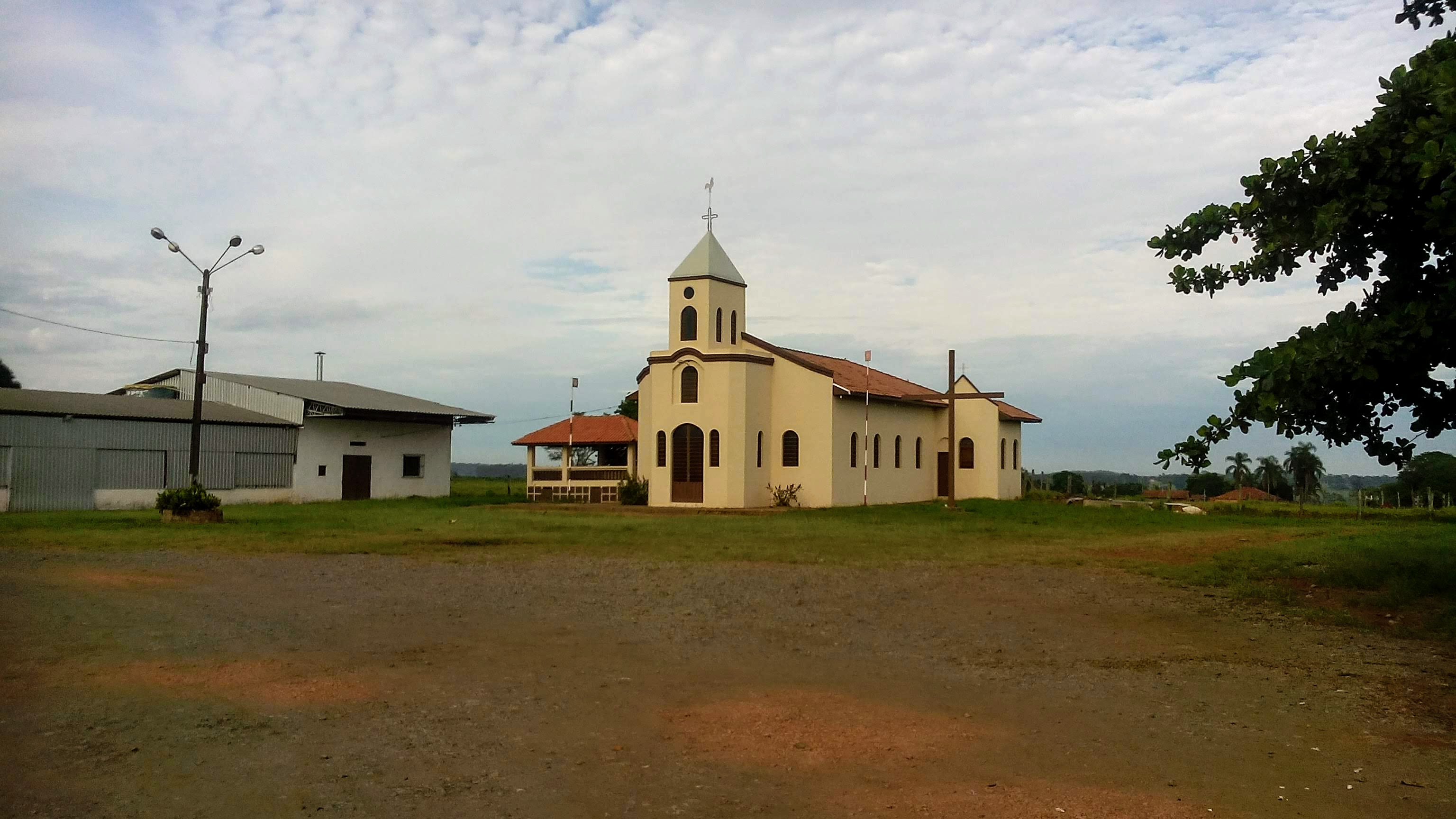 Capela Santo Antônio e barracão de festas, bairro Abóboras, em Laranjal Paulista.